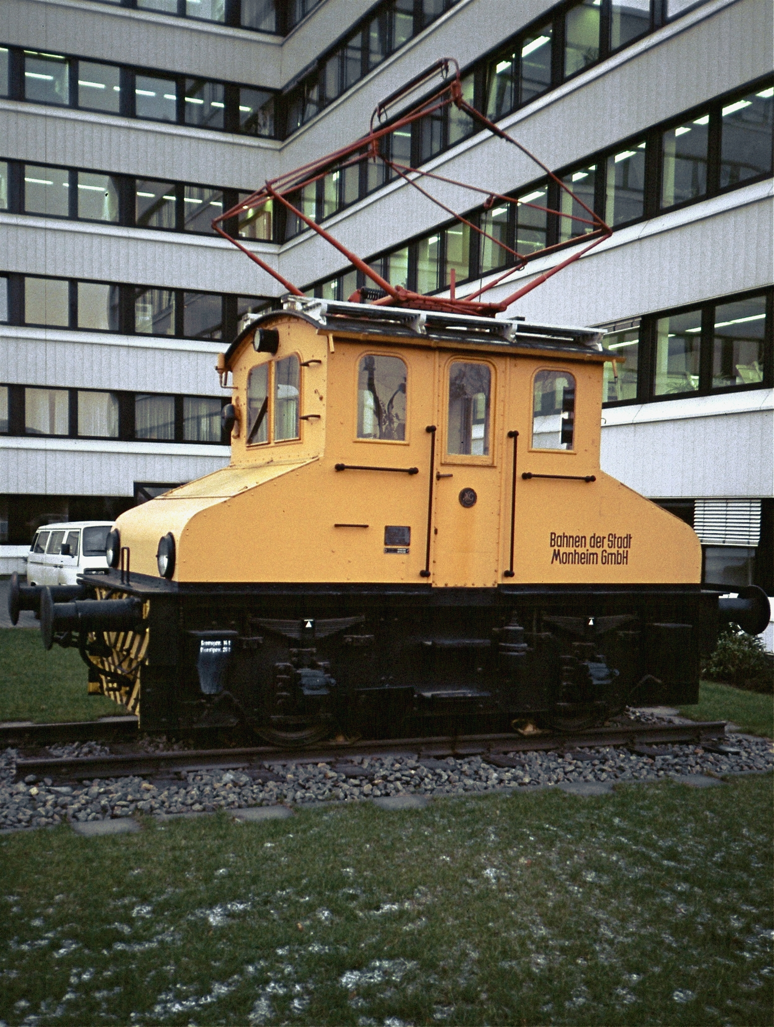 BSM-Lok 1 als Denkmal in Berlin an der Nonnendammallee